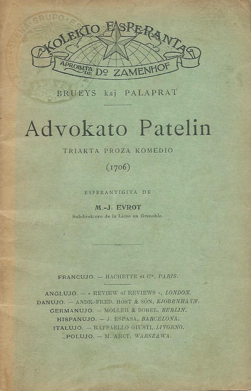 librokovrilo de "Advokato Patelin", 1904